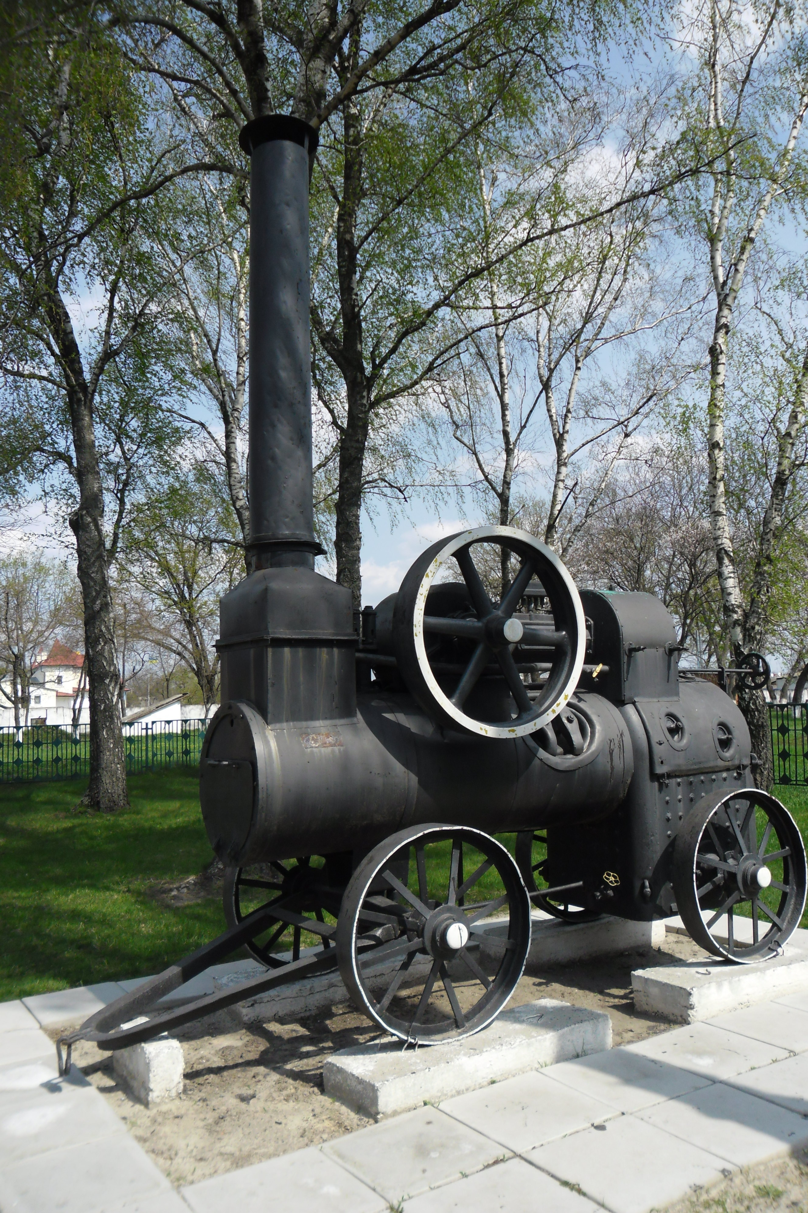 Фото